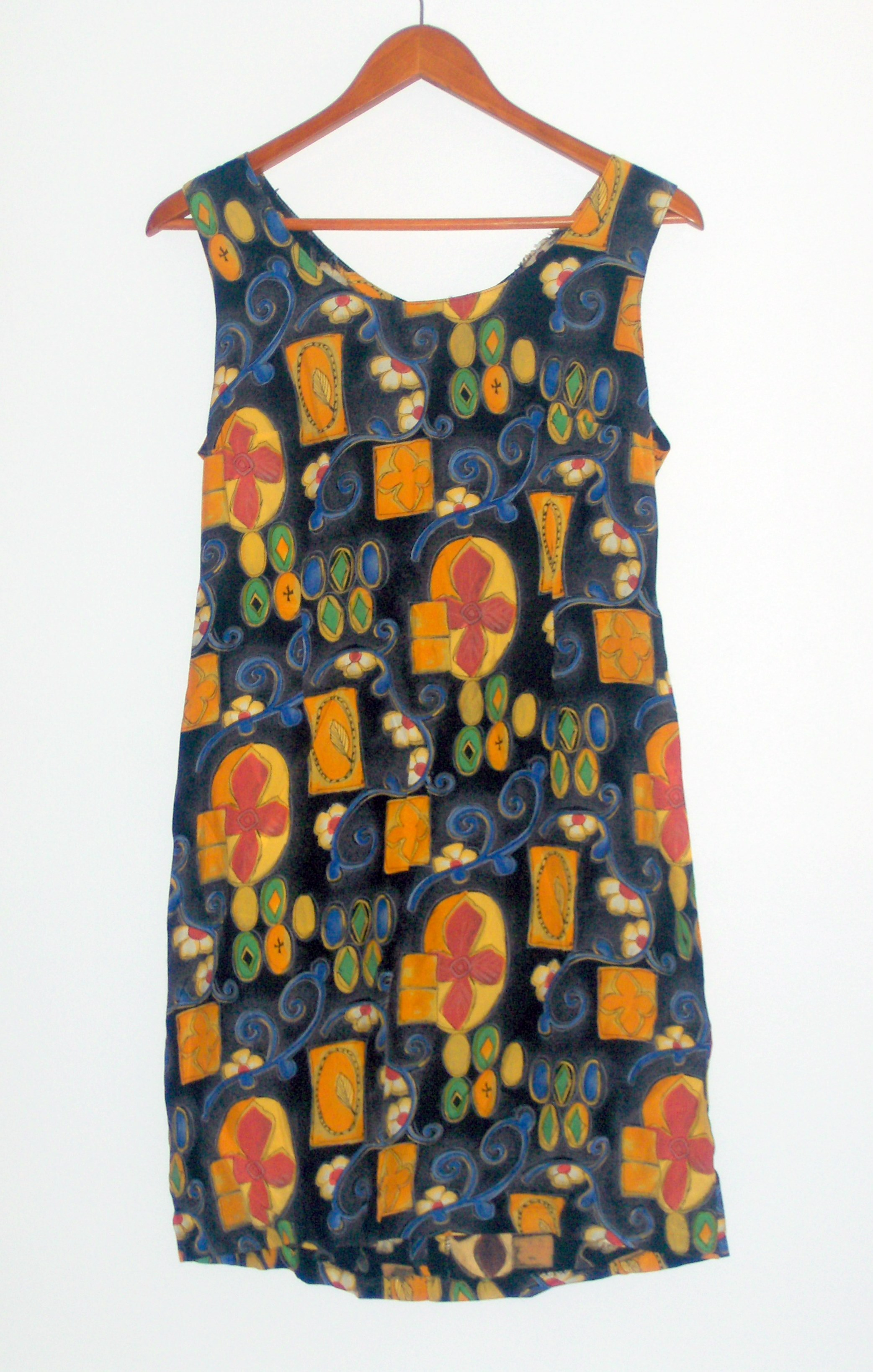 Vestido